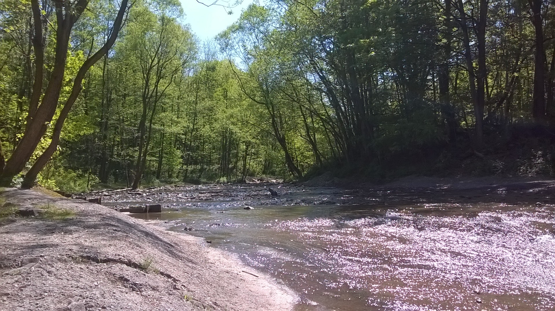 Park krajobrazowy Park Krajobrazowy Beskidu Śląskiego.